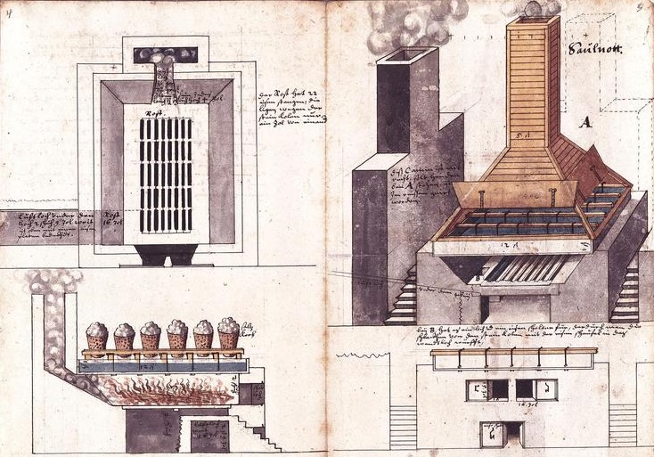 Mit Kohle beheizter Dampfkessel für die Saline Saulnot (Département Haute-Saône).